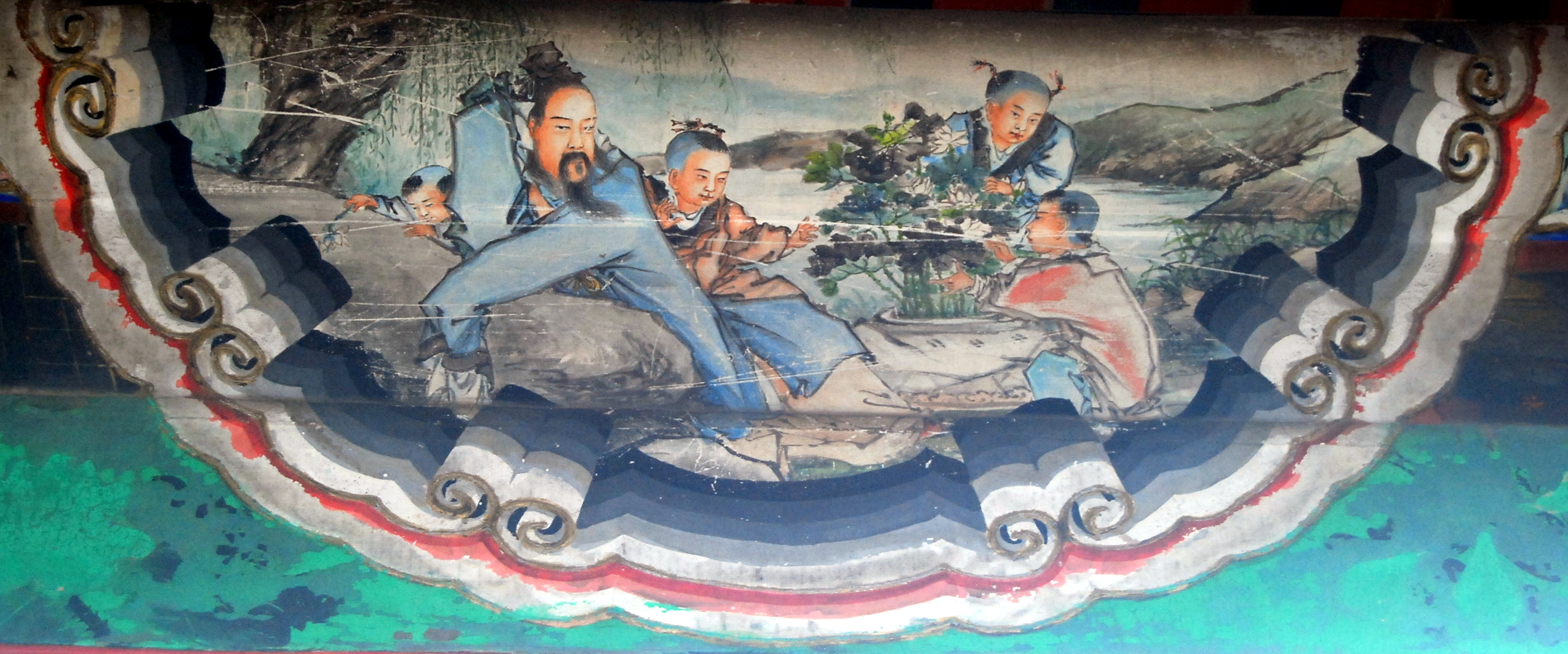 颐和园长廊上的彩绘：茂叔爱莲